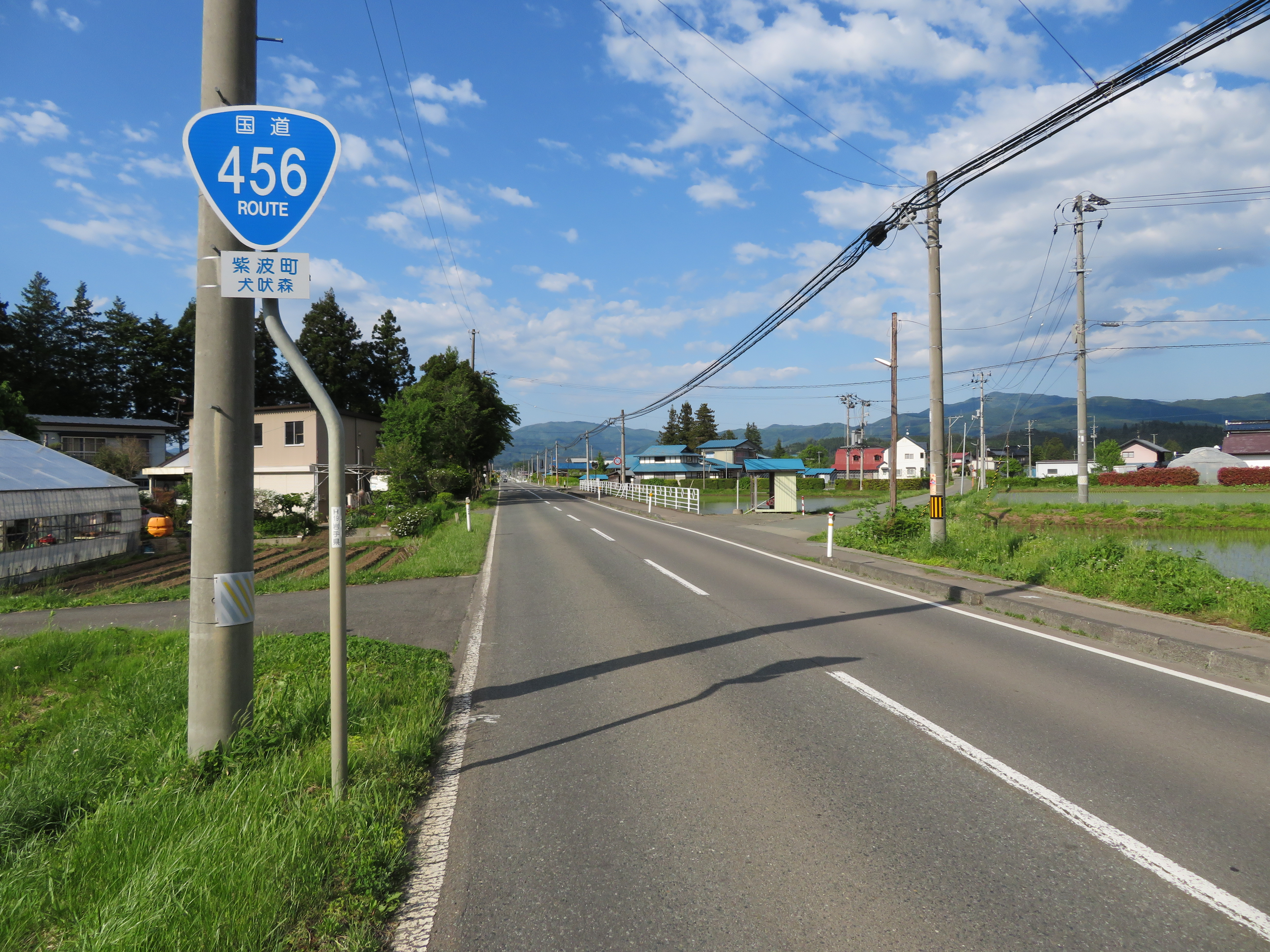 国道456号線岩手県紫波郡紫波町犬吠森付近（盛岡方面を撮影） Canon PowerShot SX720 HS